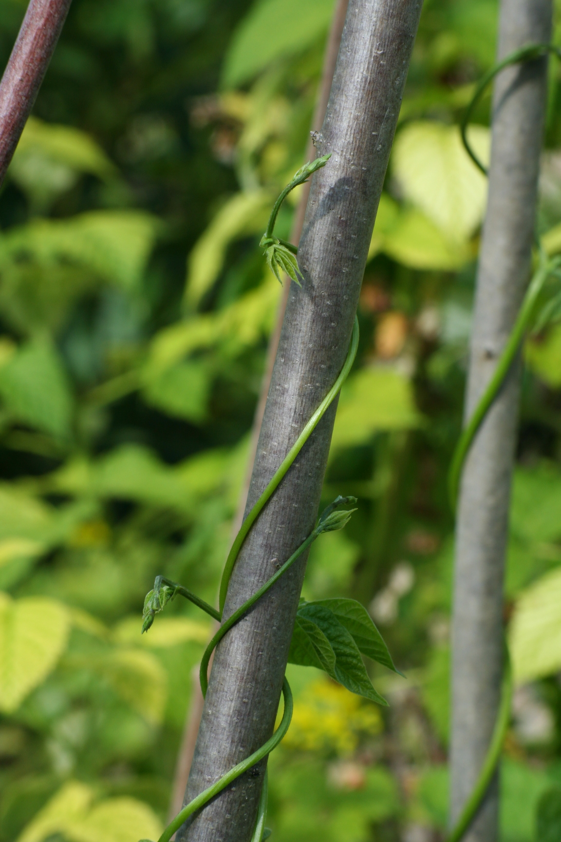 tige volubile de haricot grimpant (Phaseolus vulgaris)